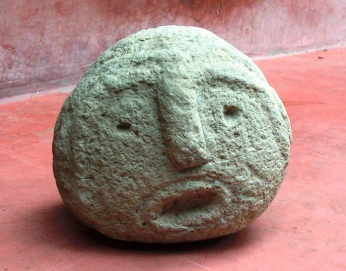 Pieza prehispánica El hombre de Achiutla, San Juan Achiutla, Oaxaca, Méxdico